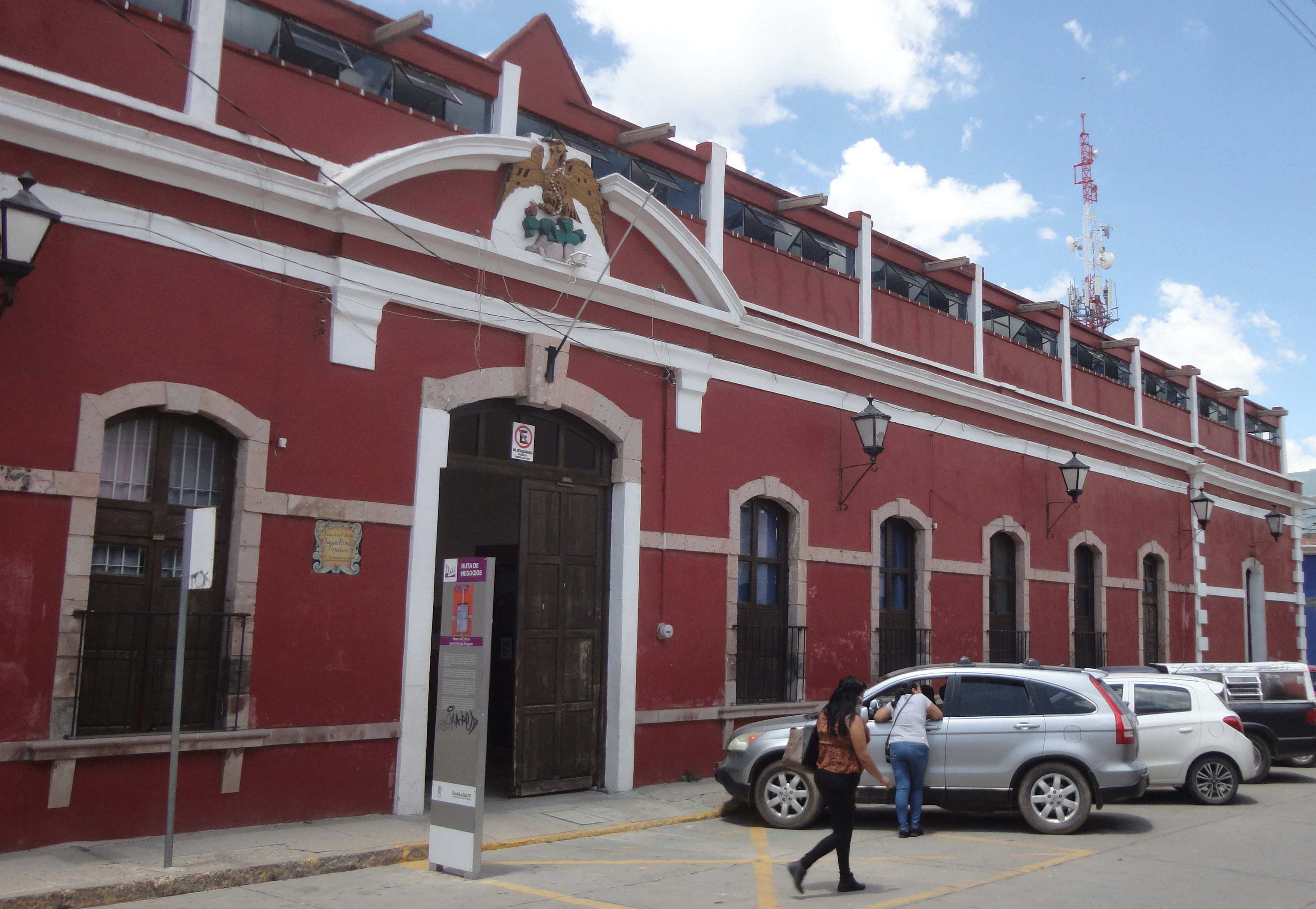 Cuartel Venustiano Carranza - Silao, Guanajuato, México.